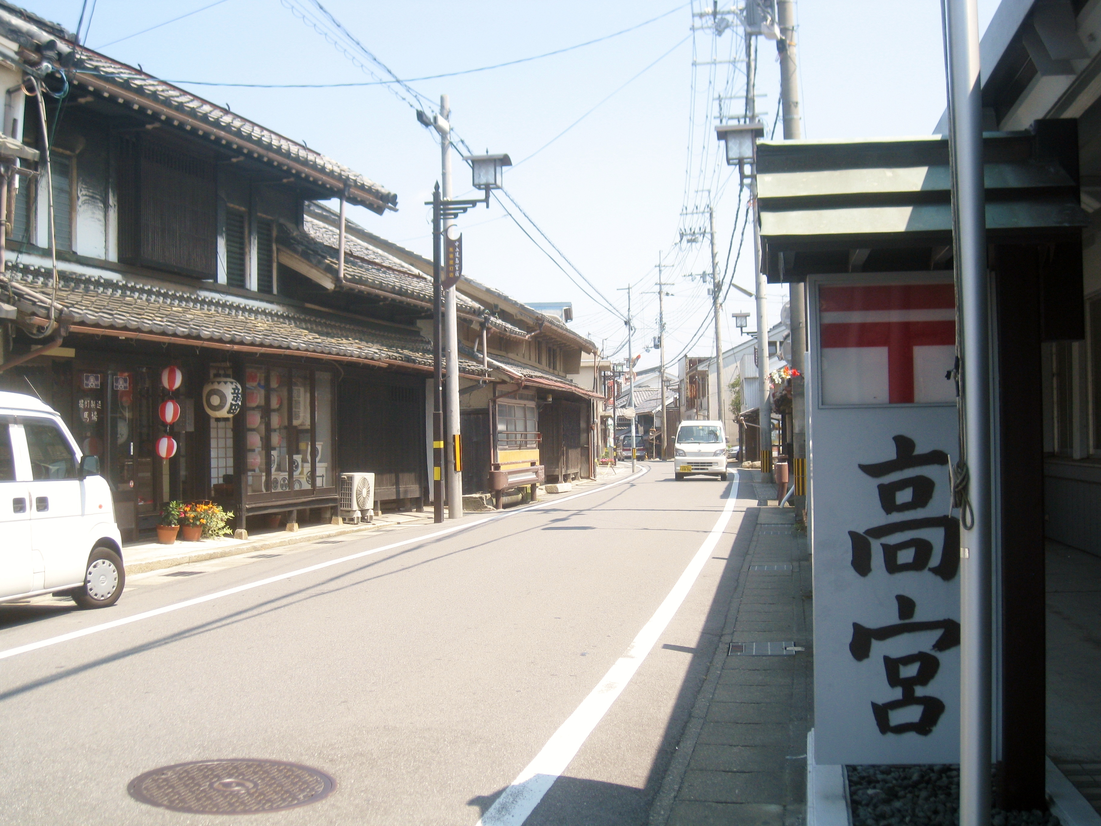 旧中山道高宮宿。高宮郵便局前。